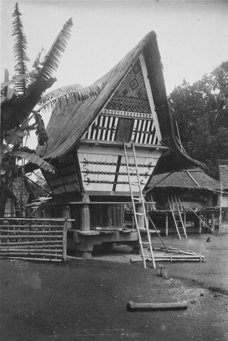 Foto. Een Karo Batak rijstschuur